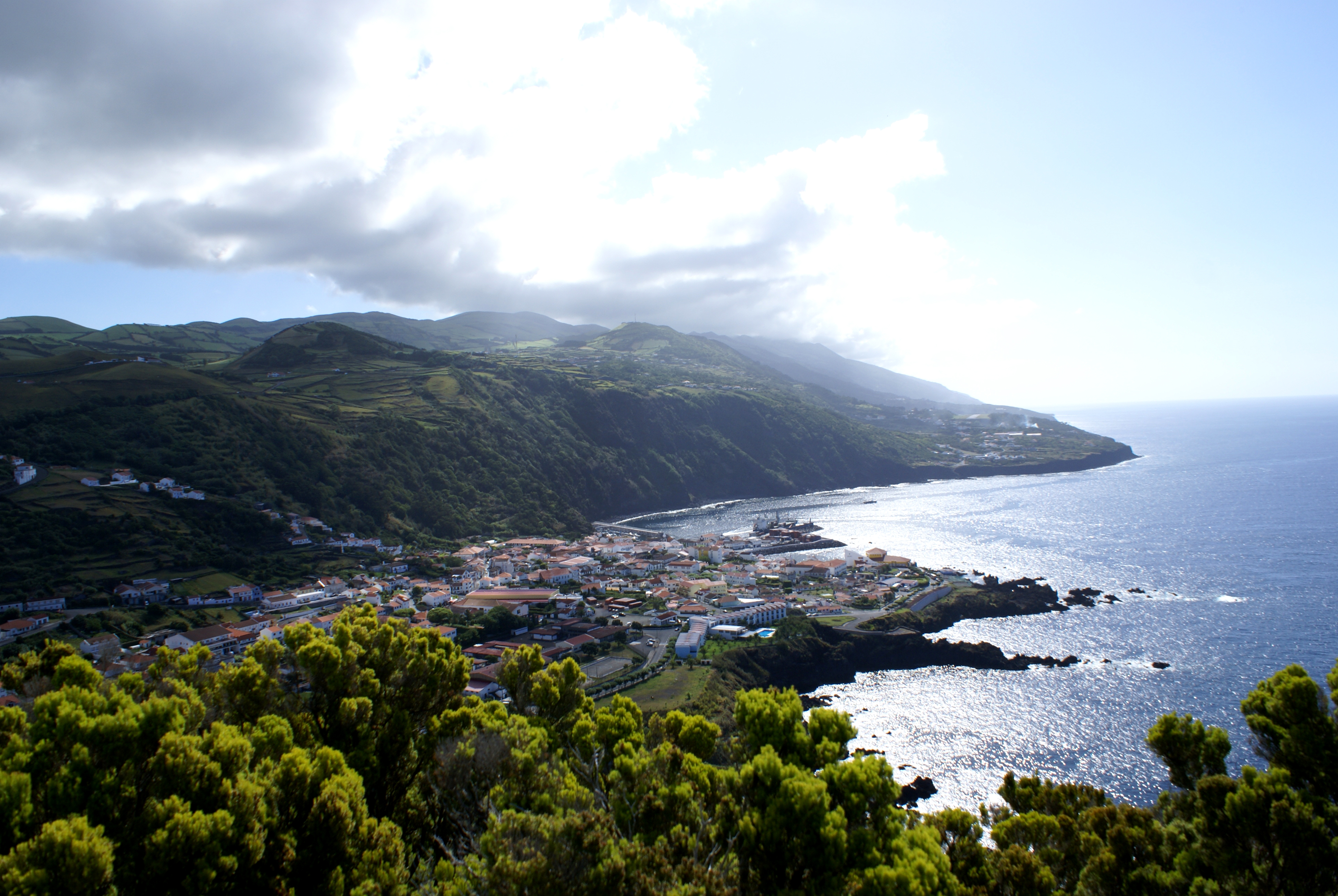 Vista parcial das Velas com a Ponta da Urzelina ao fundo, Velas, ilhas de São Jorge, Açores